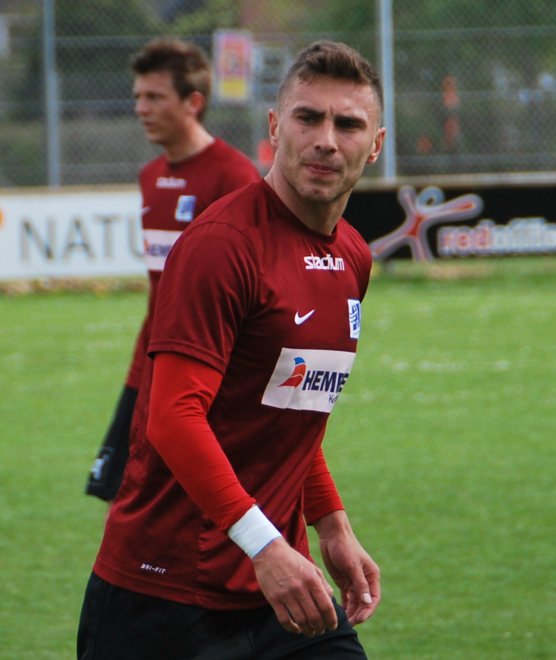 Fodboldspilleren Bajram Fetai fra Lyngby Boldklub. Her under en reservekamp mod Viborg FF på Viborgs træningsanlæg på Kirkebækvej.